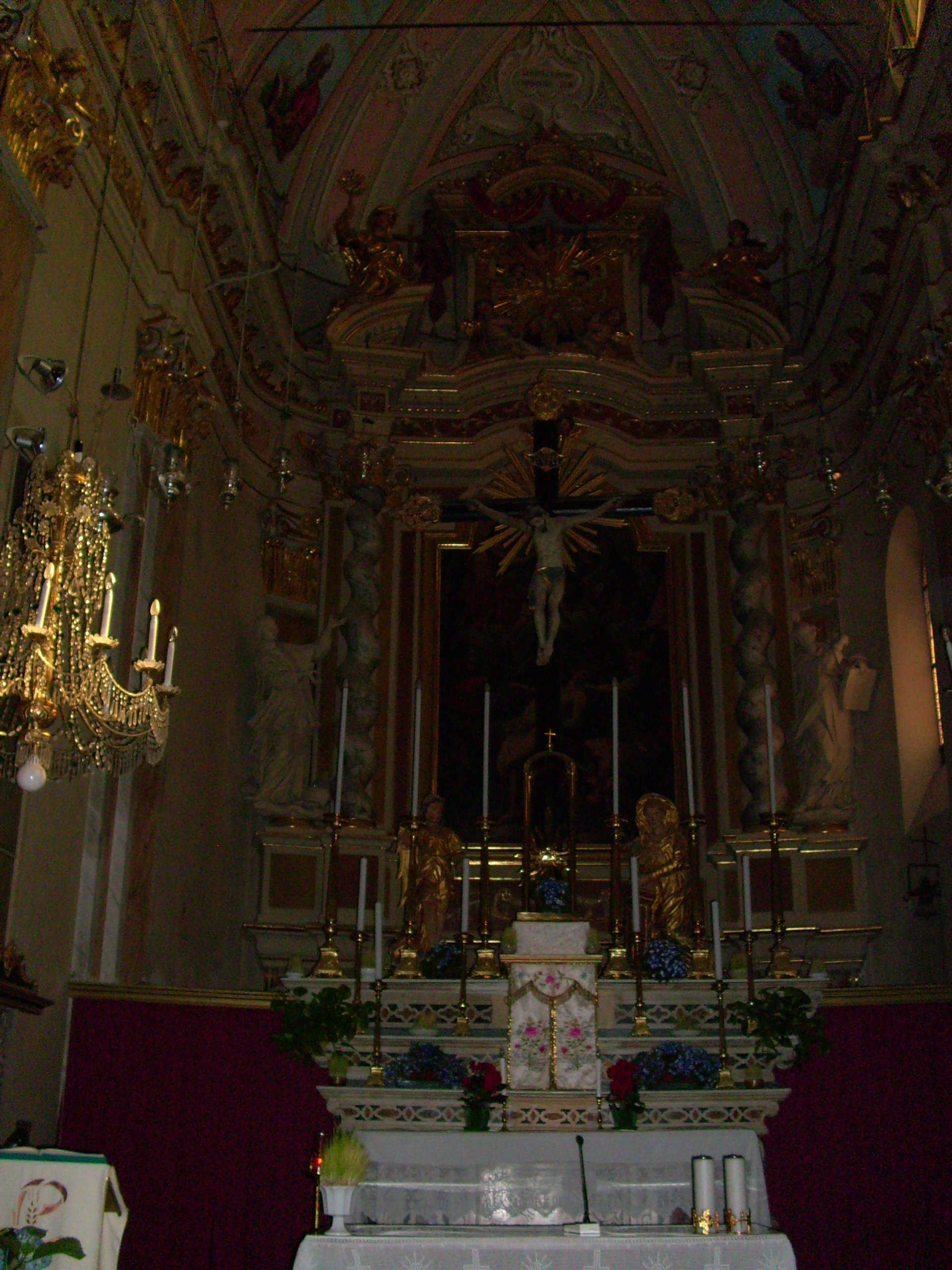 Interno della chiesa di San Lorenzo di Molini di Triora, Liguria, Italia